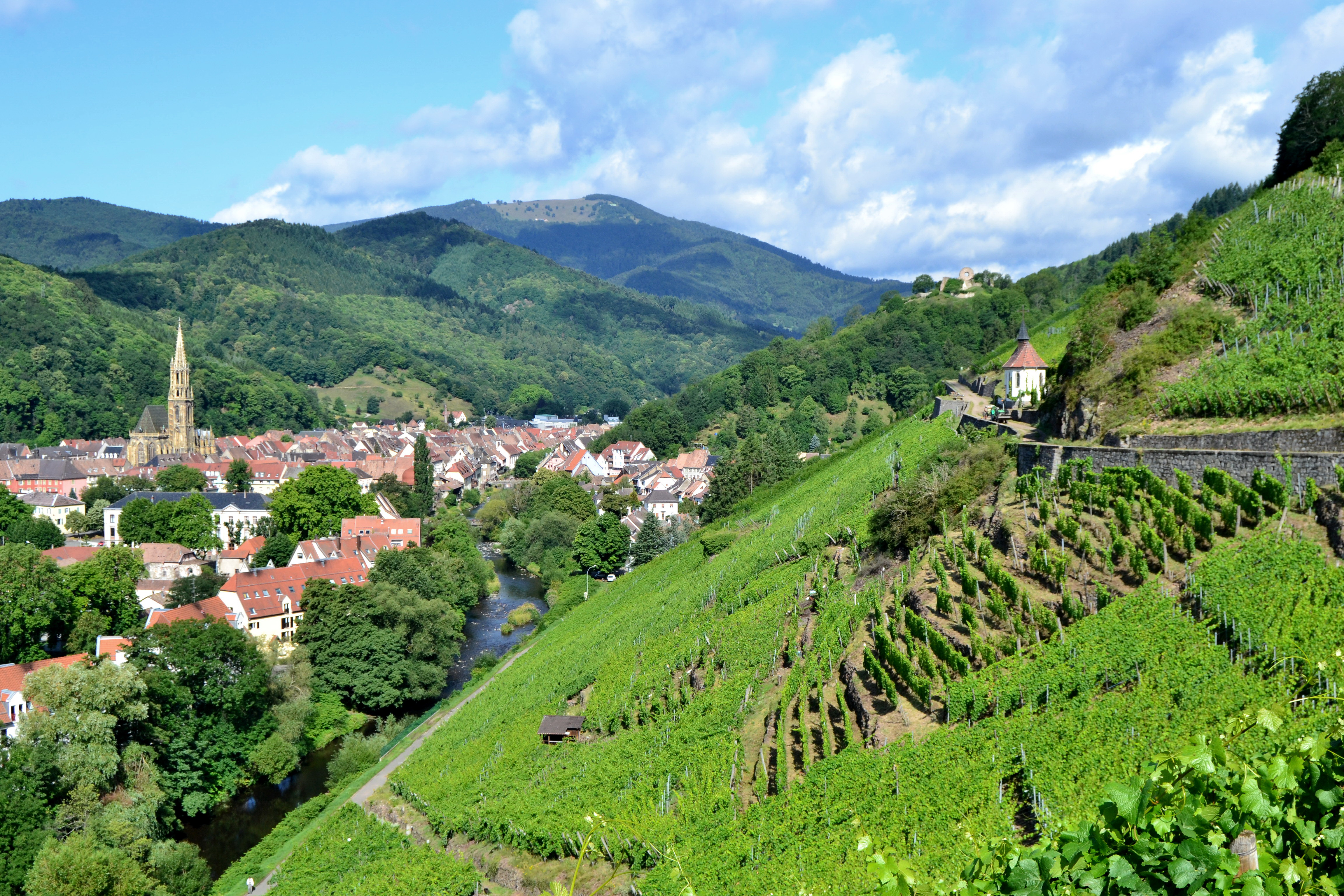 Thann vue depuis le vignoble grand cru du Rangen, Alsace, France